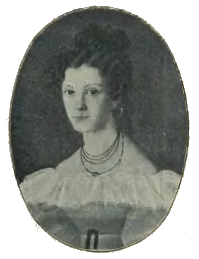 Den norske skuespillerinnen Henriette Bjerregaard, f. Hansen.